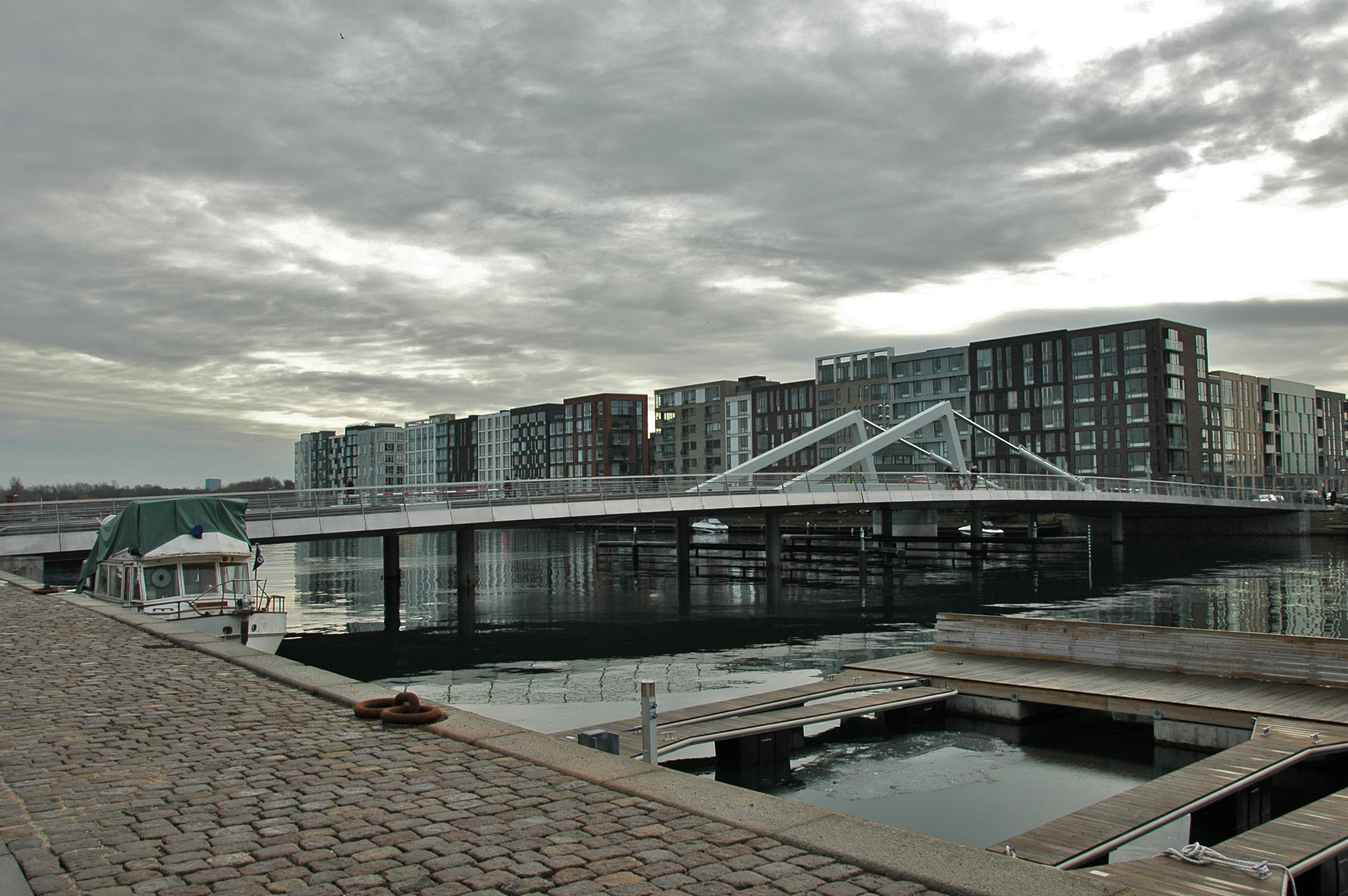 Teglværksbroen i København, der forbinder Sluseholmen med Teglholmen